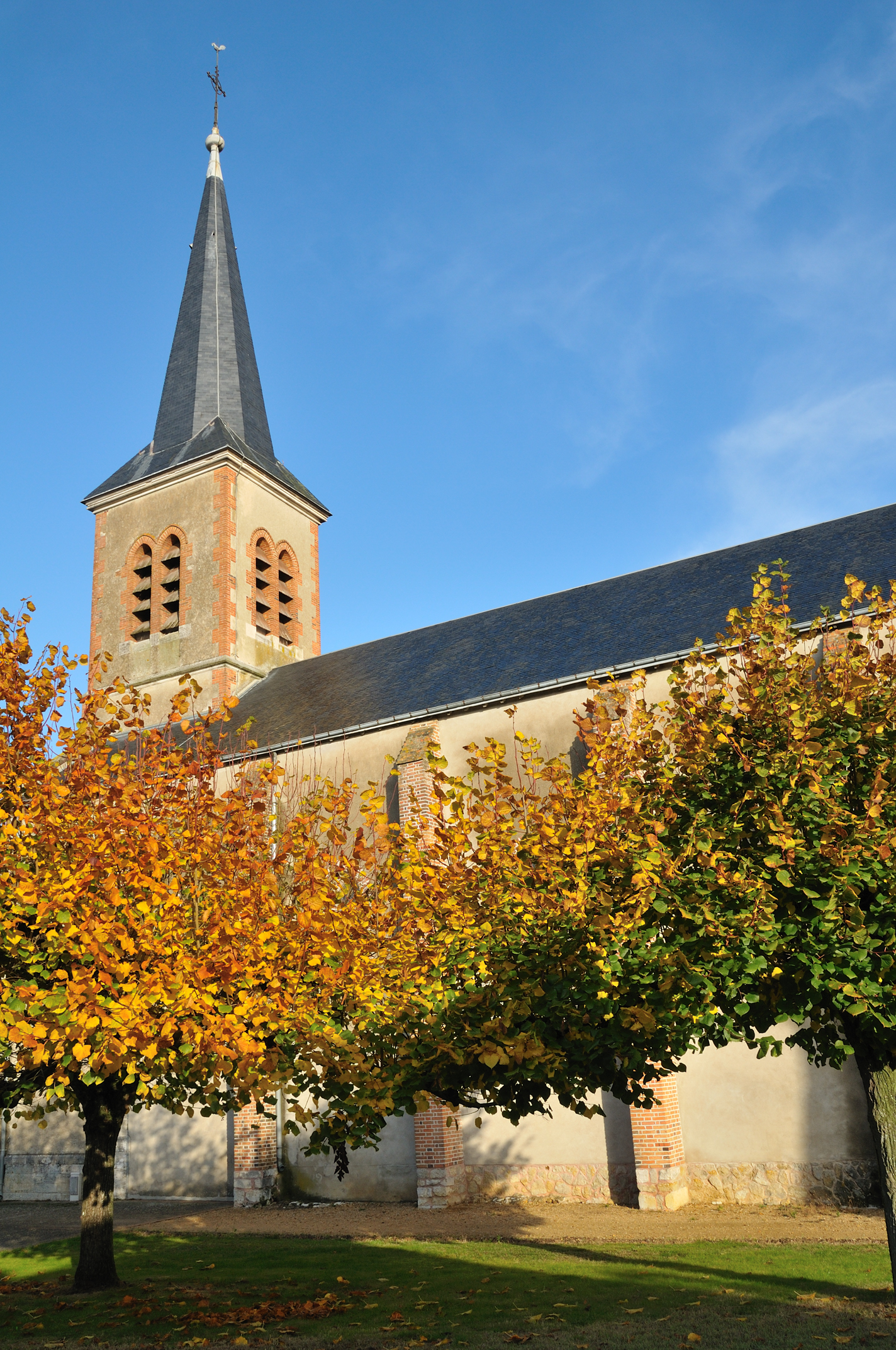 Église Saint-Jean-Baptiste, Neuvy-en-Sullias, France